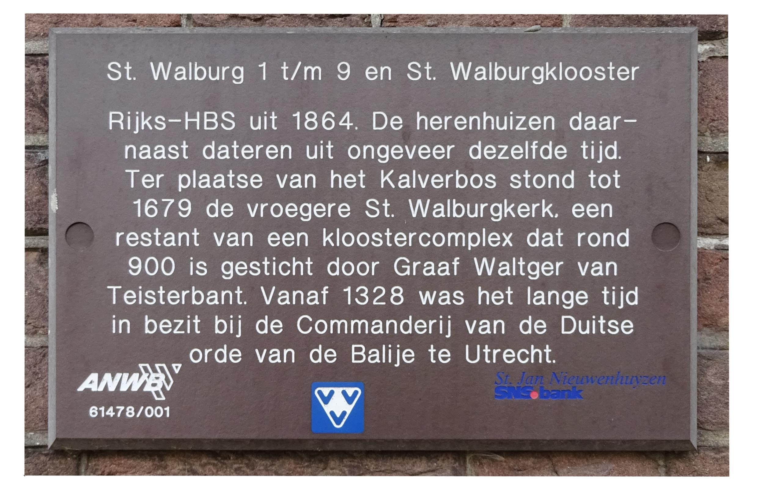 Plaquette Rijks-hbs te Tiel